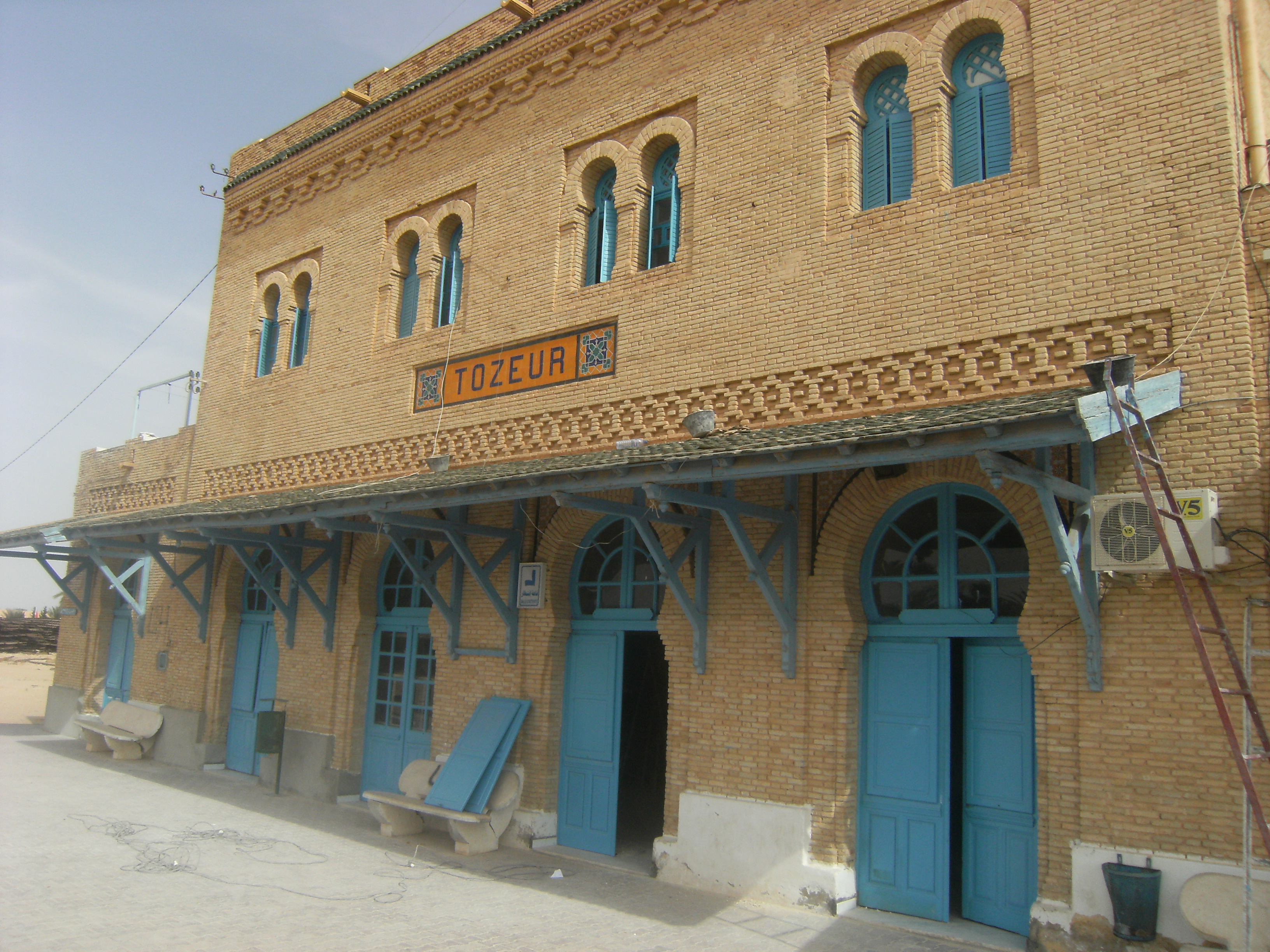 Gare de chemin de fer de Tozeur : façade donnant sur la voie ferrée et façade sur la ville, Tozeur